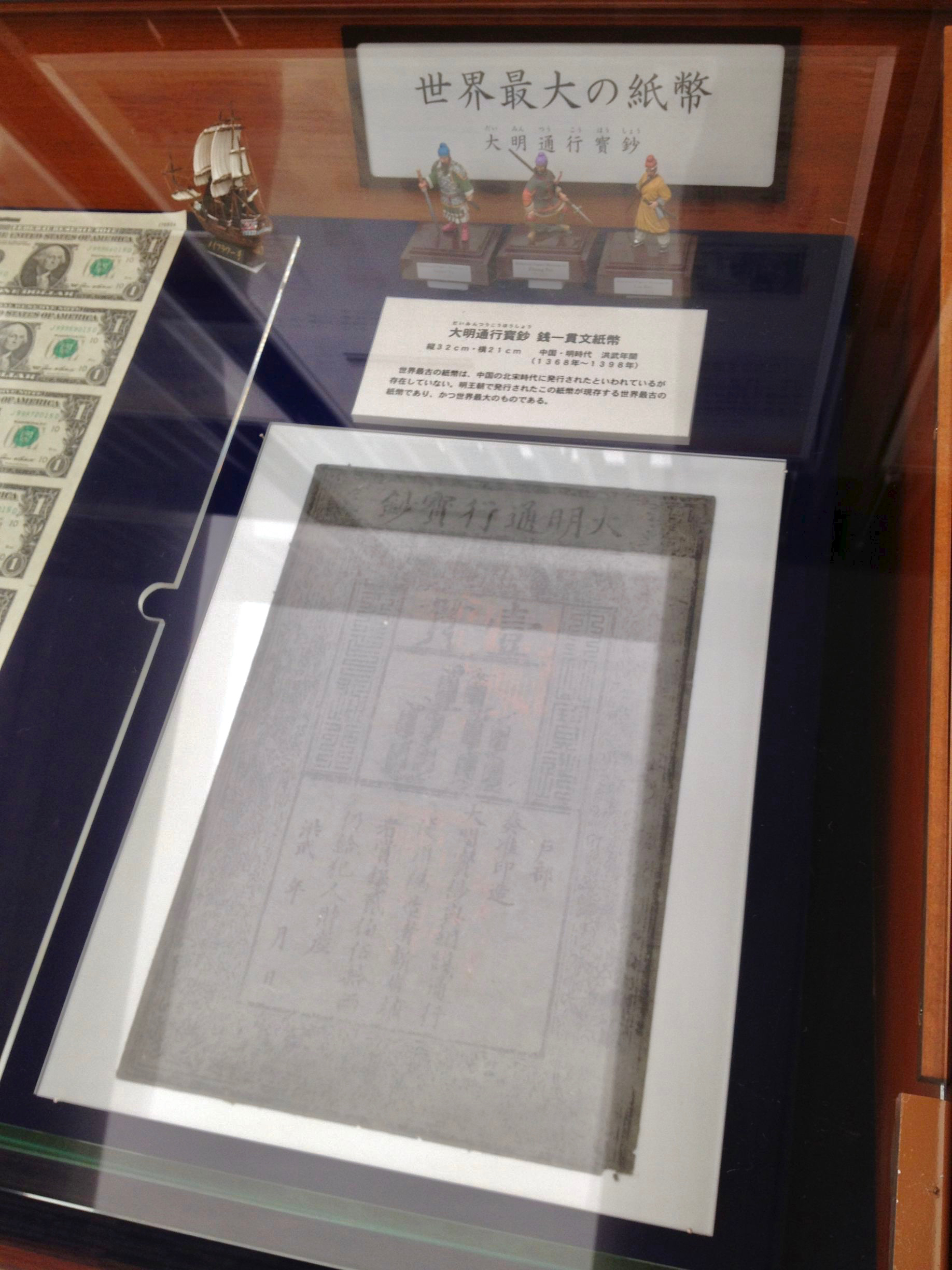 三菱UFJ銀行貨幣資料館に展示されてた中国・明王朝 洪武年間（1368〜1398年）に発行された紙幣「大明通行寳鈔（だいみんつうこうほうしょう）銭一貫文紙幣」。三菱UFJ銀行貨幣資料館の説明によれば、明王朝で発行されたこの紙幣が現存する世界最古にして最大の紙幣とのこと。大きさは縦32cm・横21cm。